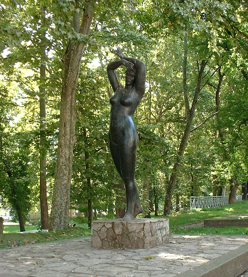 Spomenik "Djevojka sa Une", Bihac, 2006. g.